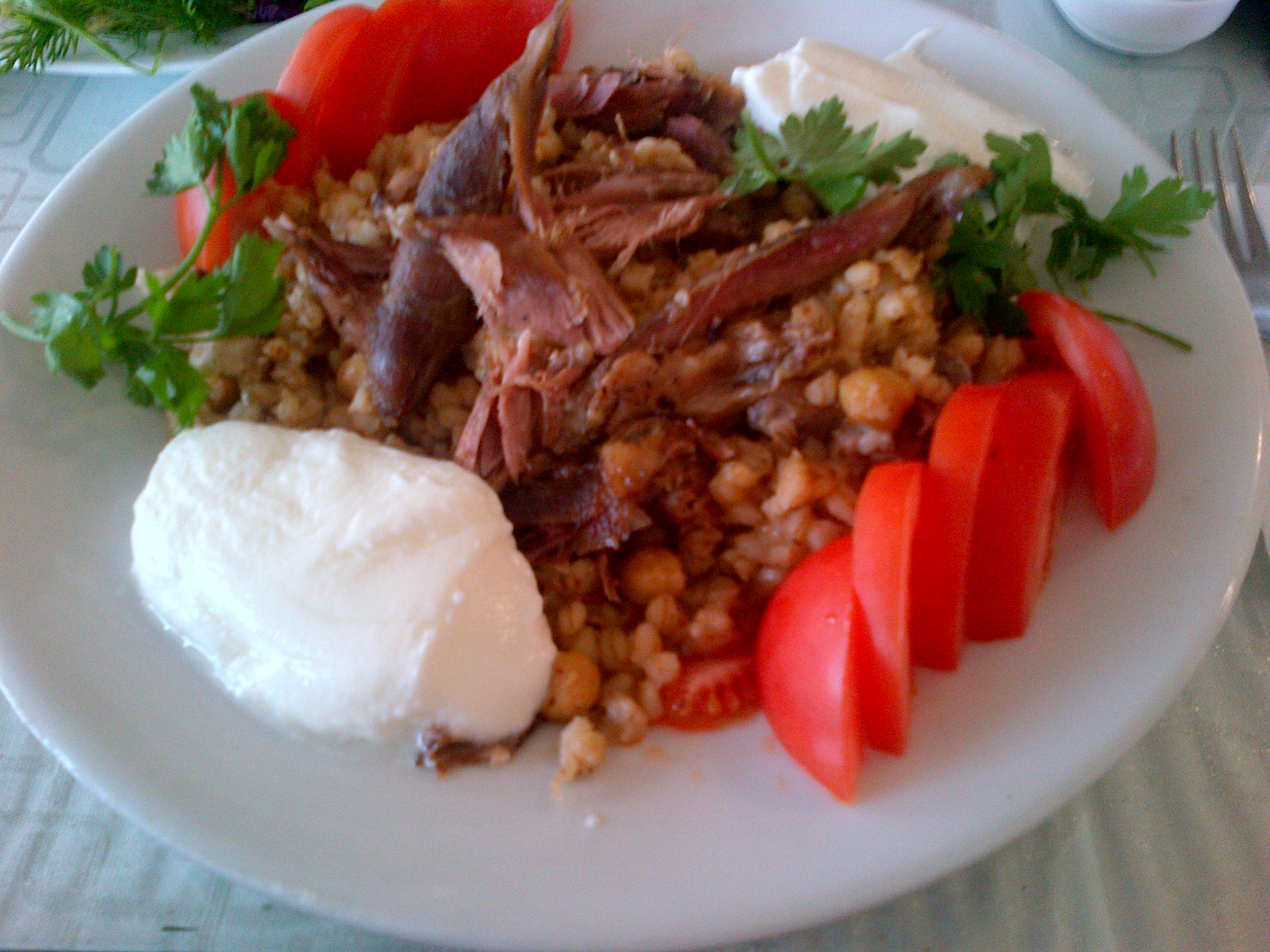 "Keşkek" al estilo de Tokat: Los granos de trigo no molidos, tiene garbanzos y lleva carne de cordero.